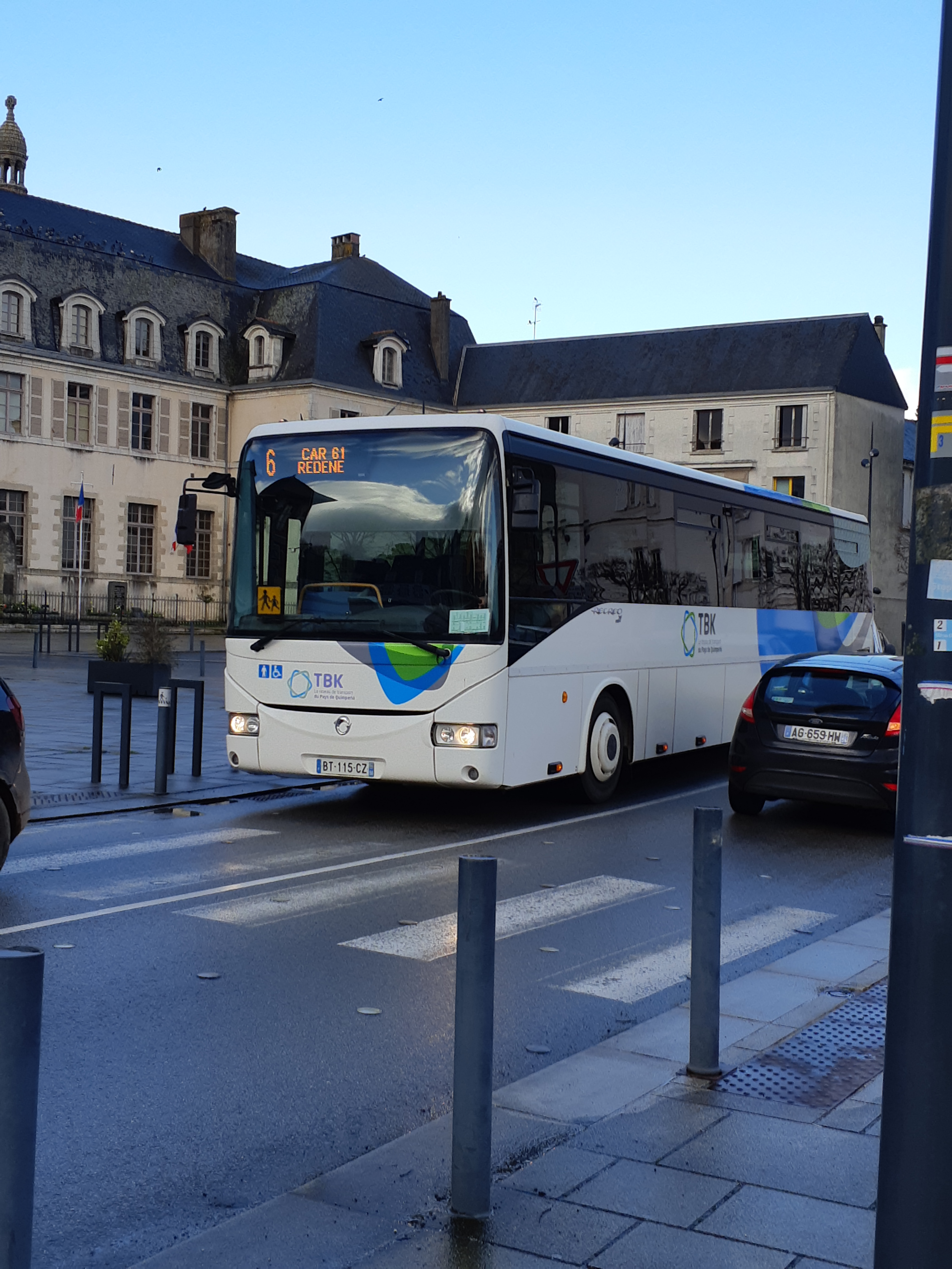 Bus Irisbus Récréo 2, officiant sur la ligne 6 du réseau TBK, le 3 mars 2020.